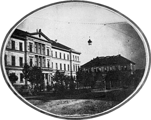 Neue Aula (Salzpapierabzug 143 × 182 mm)